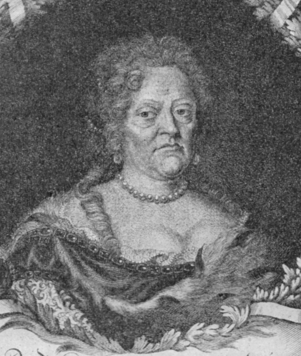 Kurfürstin Magdalene Sibylle Gemahlin Johann Georgs II. Nach einem Kupferstich von Philipp Kilian. 1628 - 93. Entwurf von Samuel Bottschild